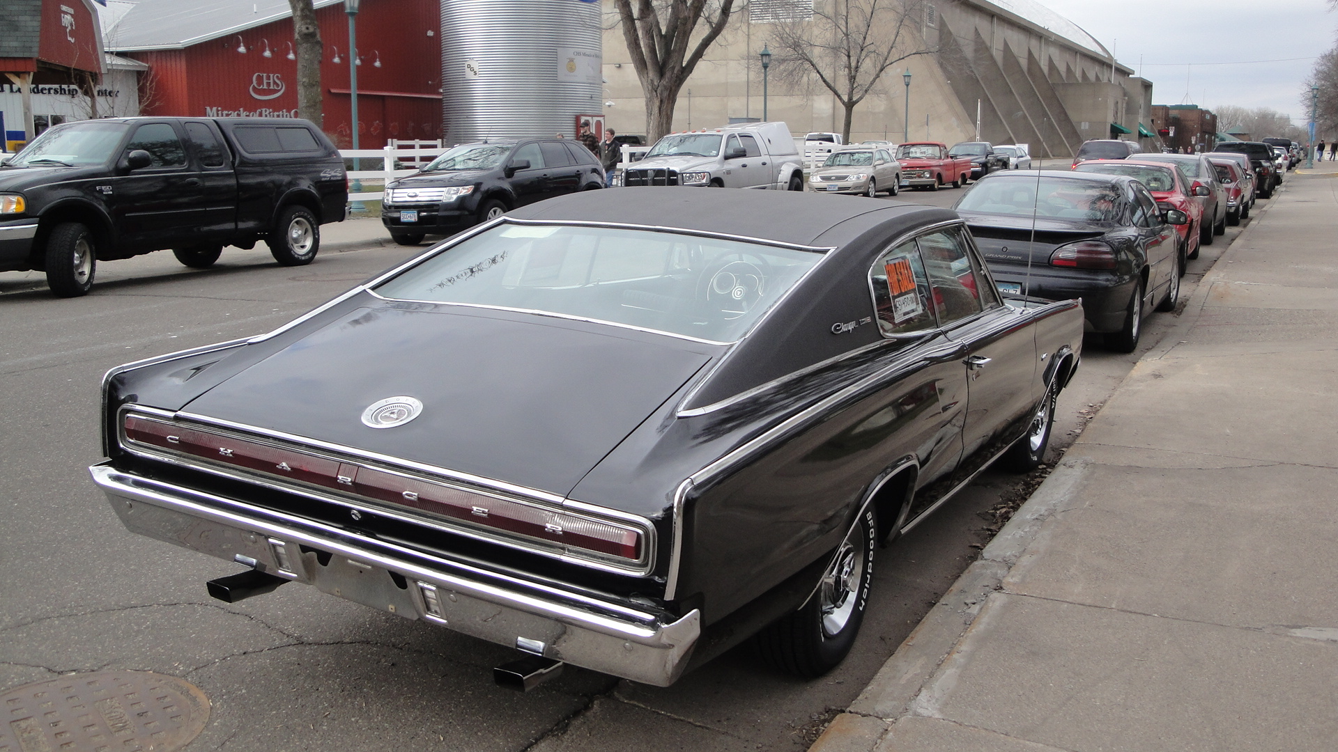 67 Dodge Charger